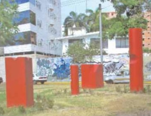 Plaza Virtual. Las Delicias.